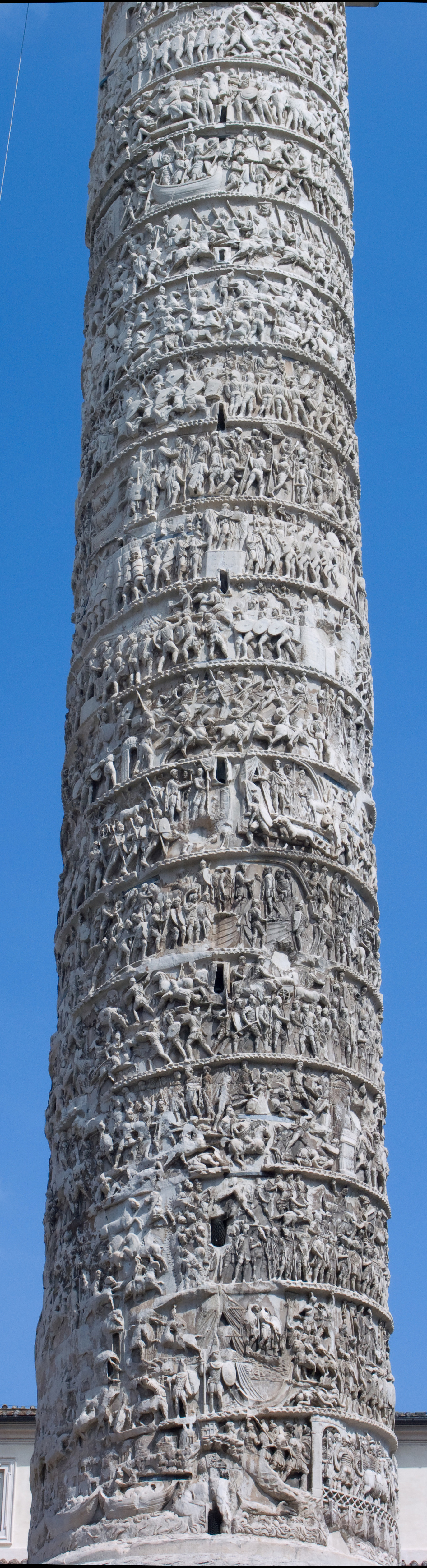 Colonne aurélienne à Rome. Détails du fut.